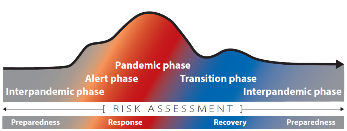 Da "Pandemic Influenza Risk Management. A WHO guide to inform & harmonize national & international pandemic preparedness and response"